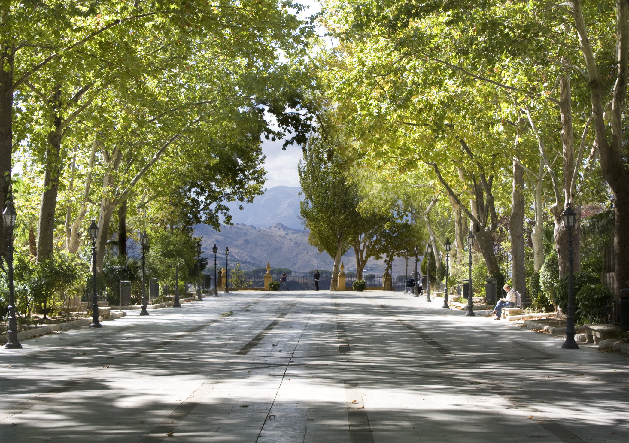 Alameda del Tajo, Ronda, España.